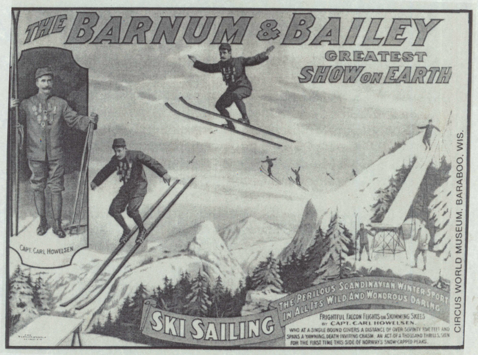 Poster du Ringling Bros. and Barnum & Bailey Circus avec Karl Hovelsen.